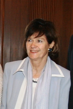 Elena Highton de Nolasco